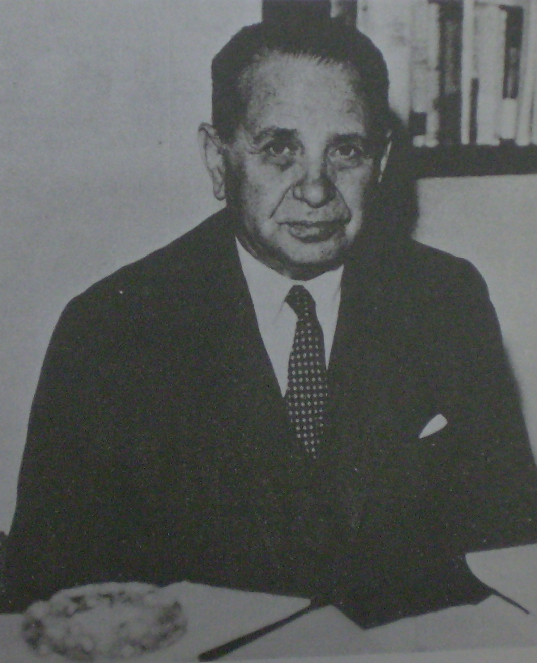 León Dujovne